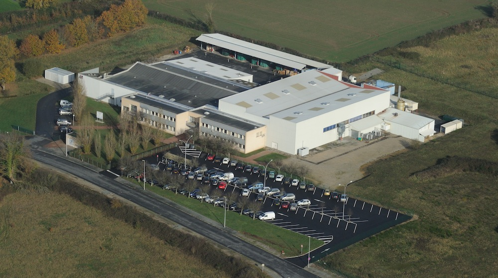 Vu du ciel